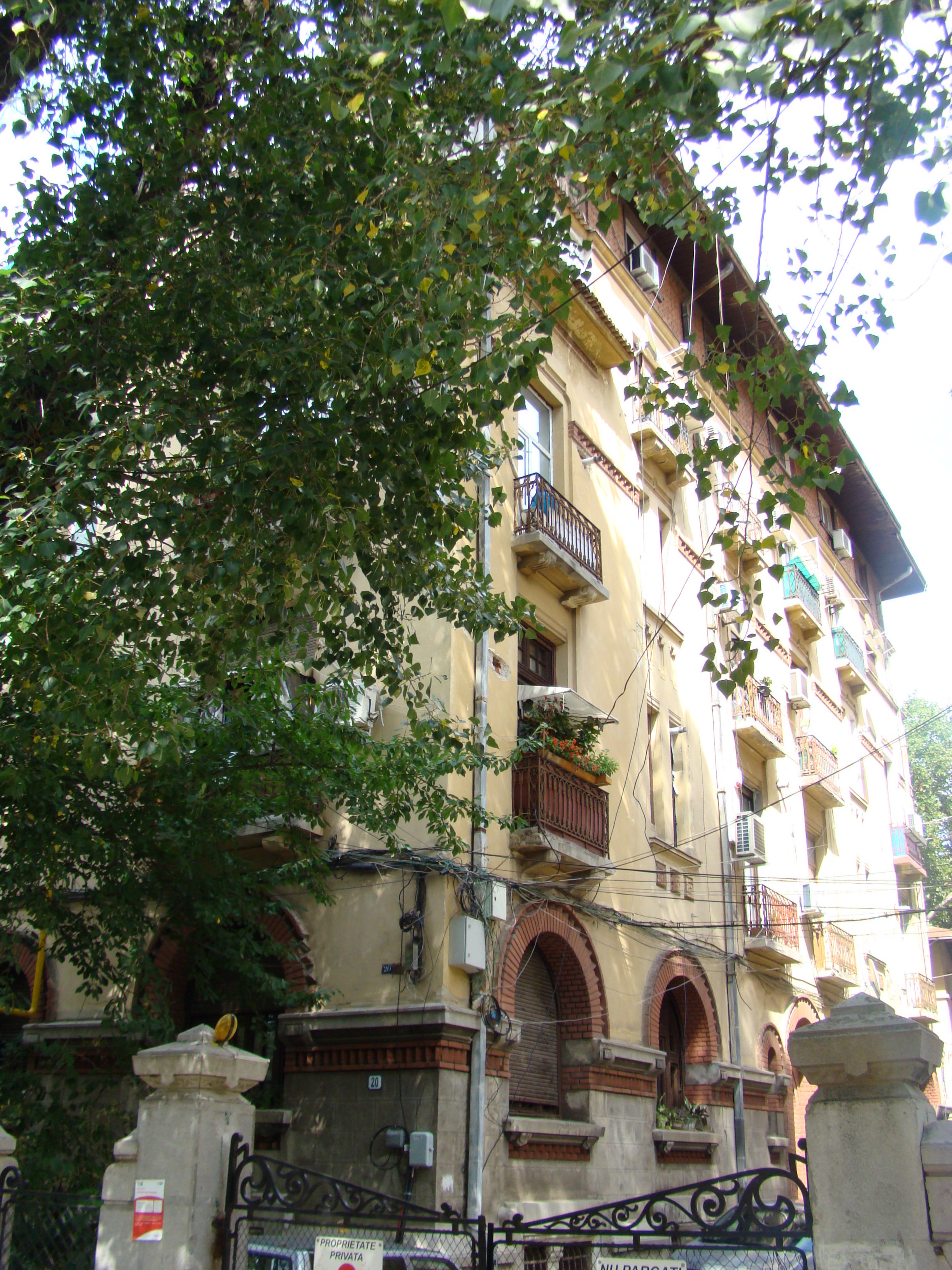 Casă monument istoric, str.Londra, nr.20